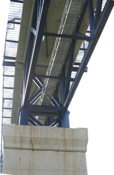 Viadukt vu Moresnet, Vue ënnert den Tablier